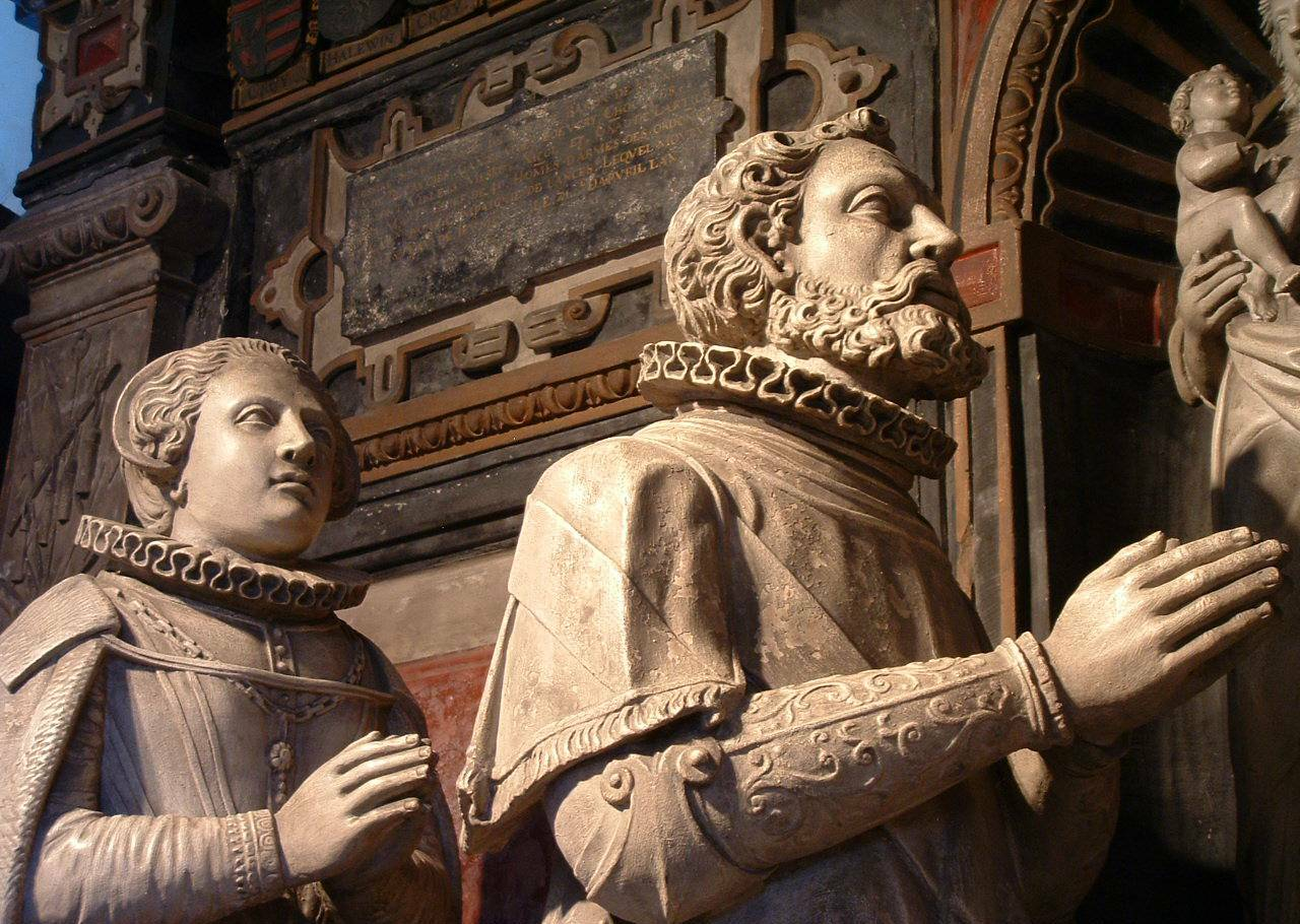 De grafkapel van de heren van Boussu (detail), 04/09/05